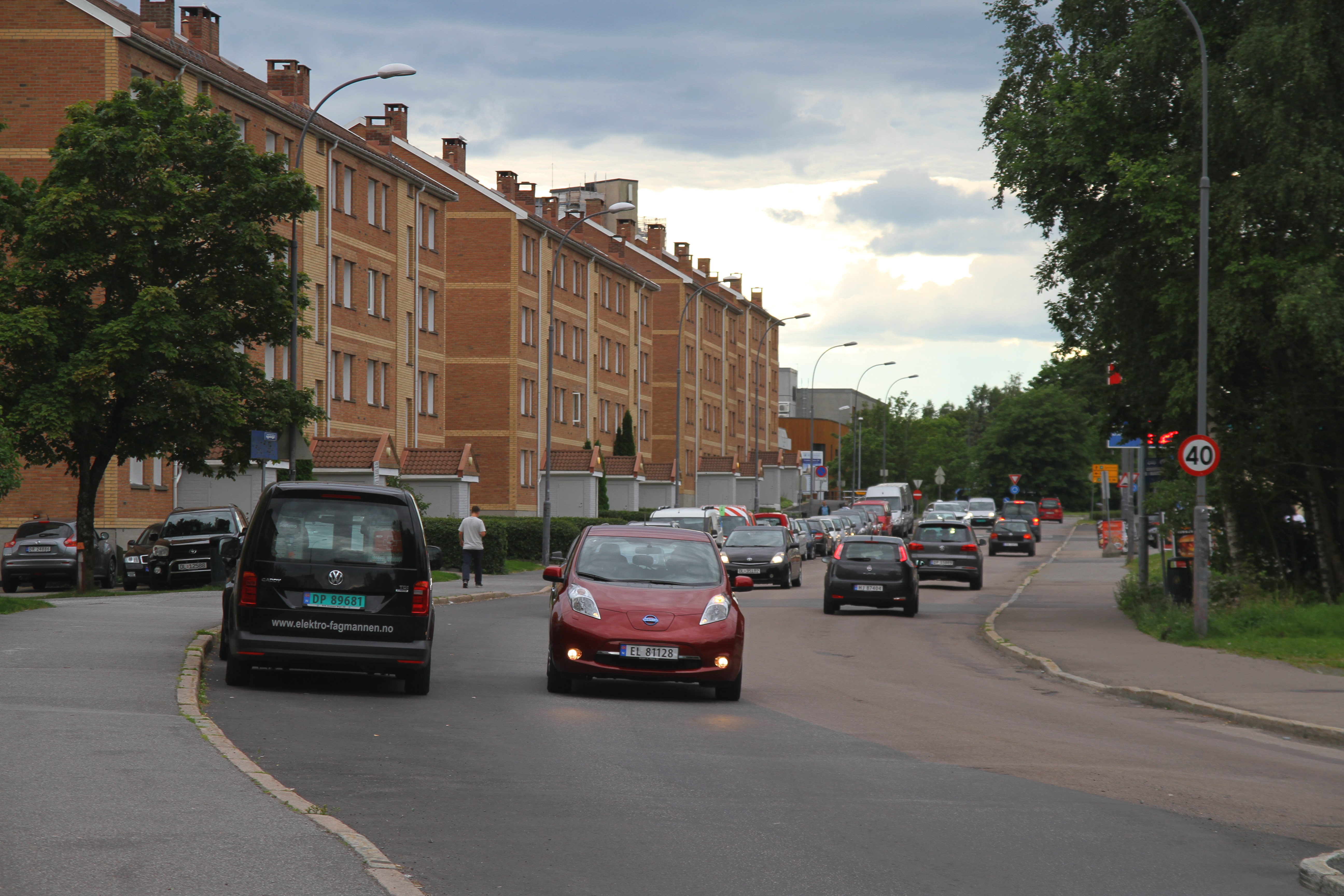 Kalbakkveien i Oslo